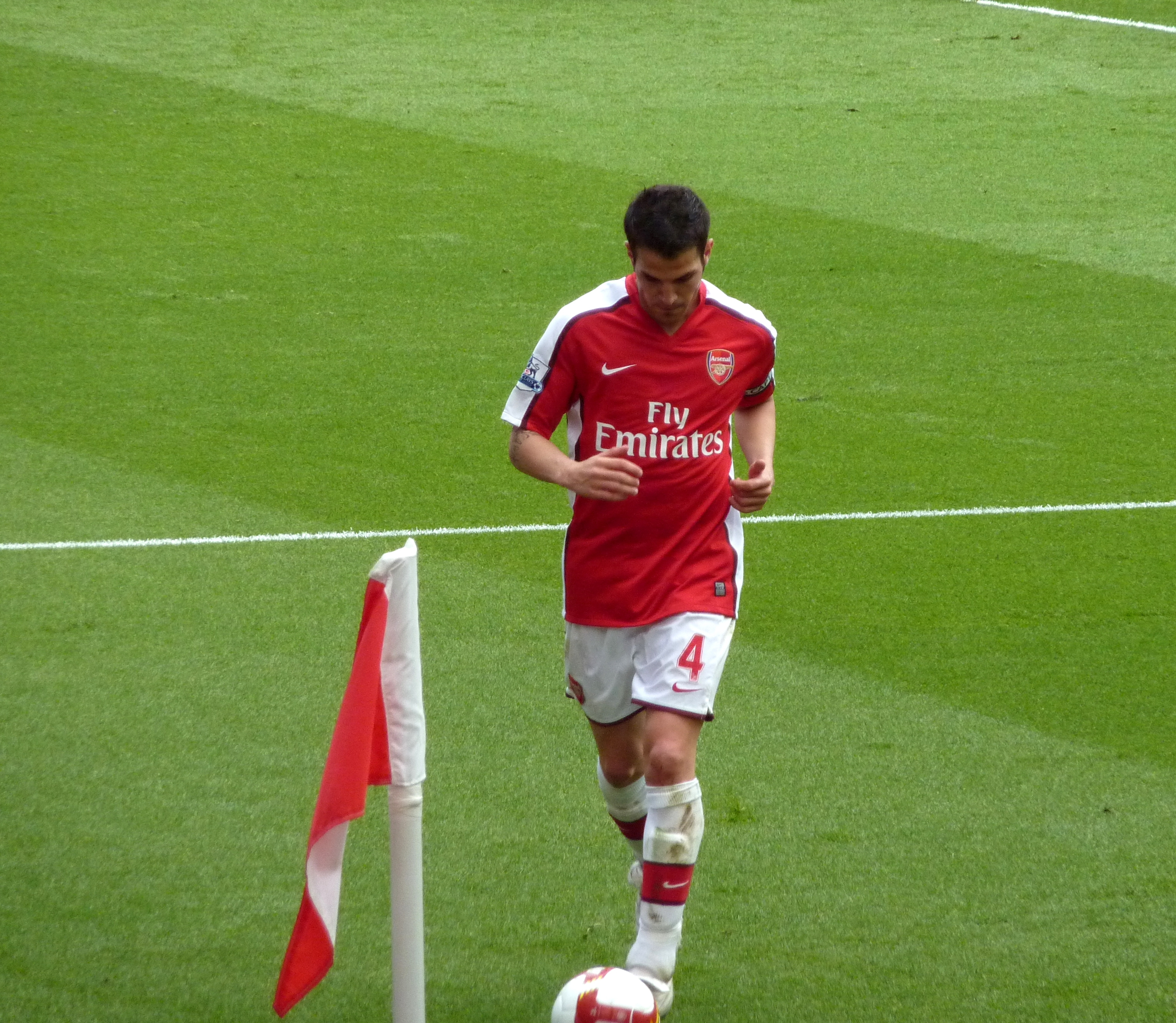 El jugador de fútbol Cesc Fàbregas.